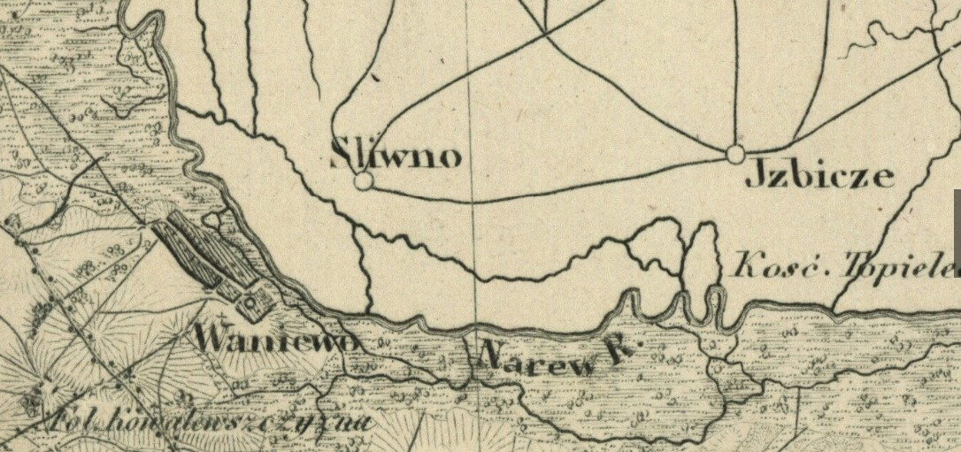 Topograficzna karta Królestwa Polskiego z późniejszymi zmianami.